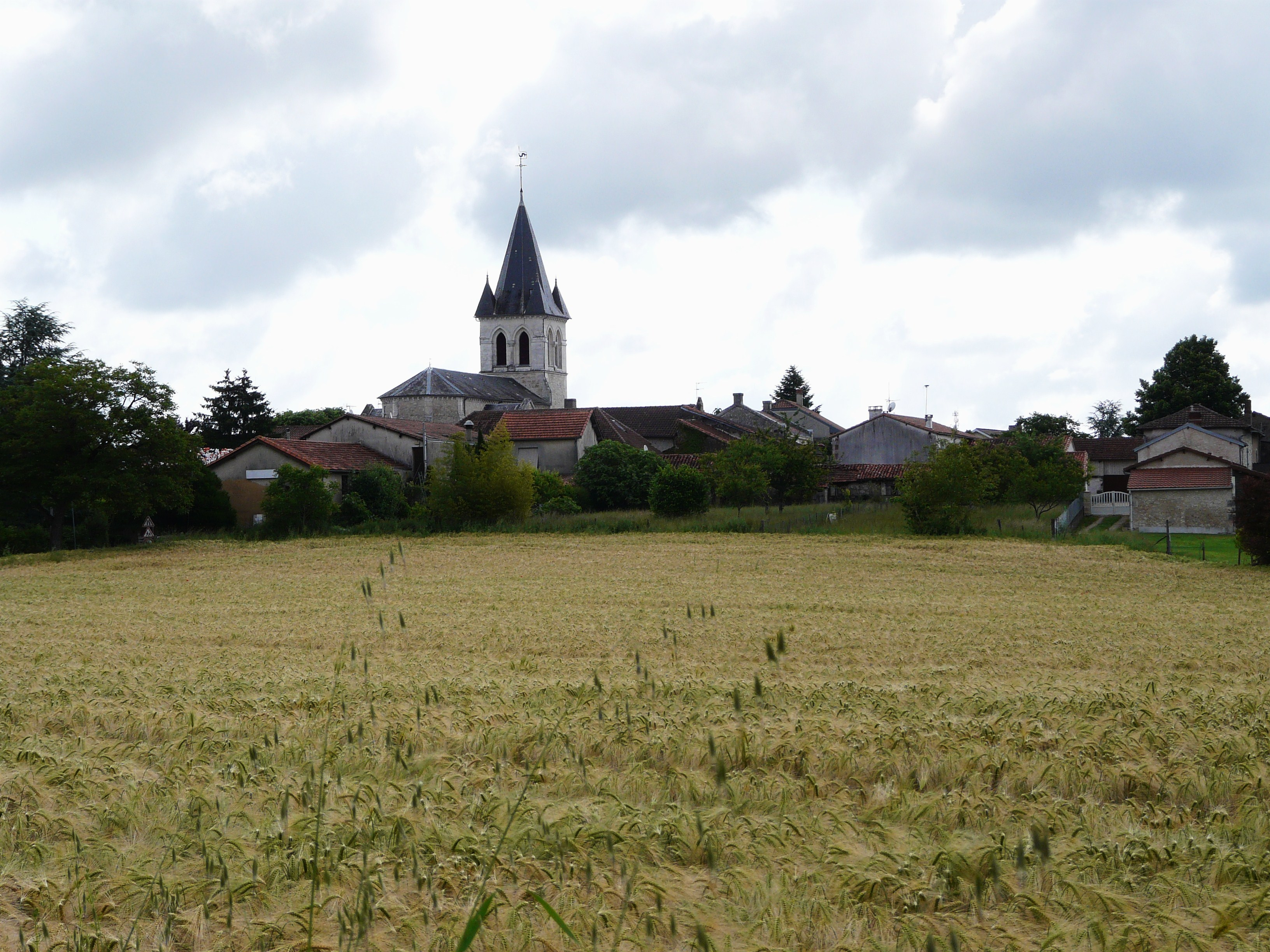 Vue générale de Champcevinel